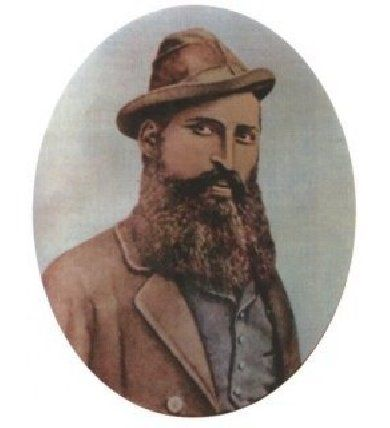 Carmine Crocco detto Donatelli